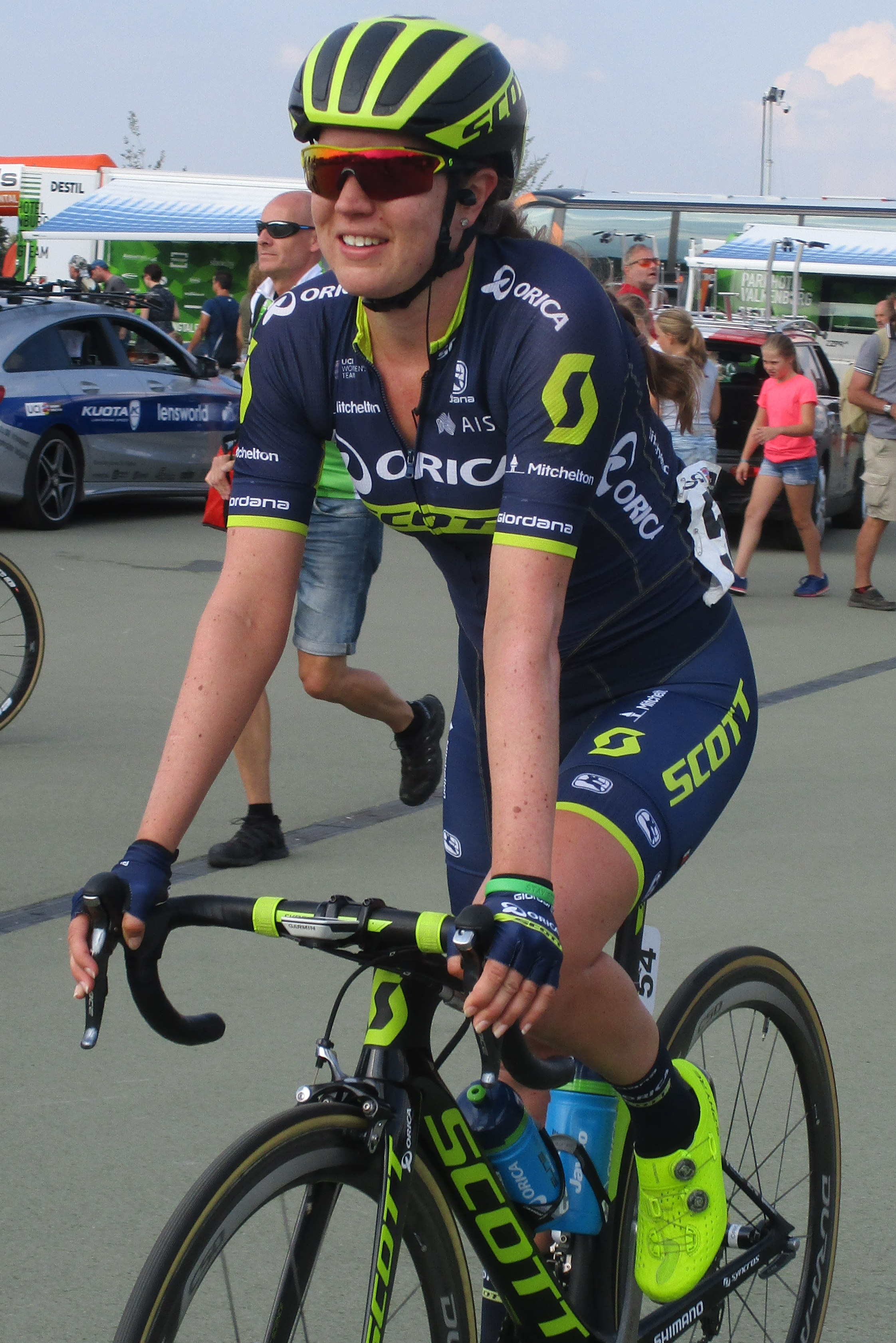 Na de finish van de laatste etappe van de Boels Ladies Tour 2017 op het Tom Dumoulin Bike Park in Sittard-Geleen.